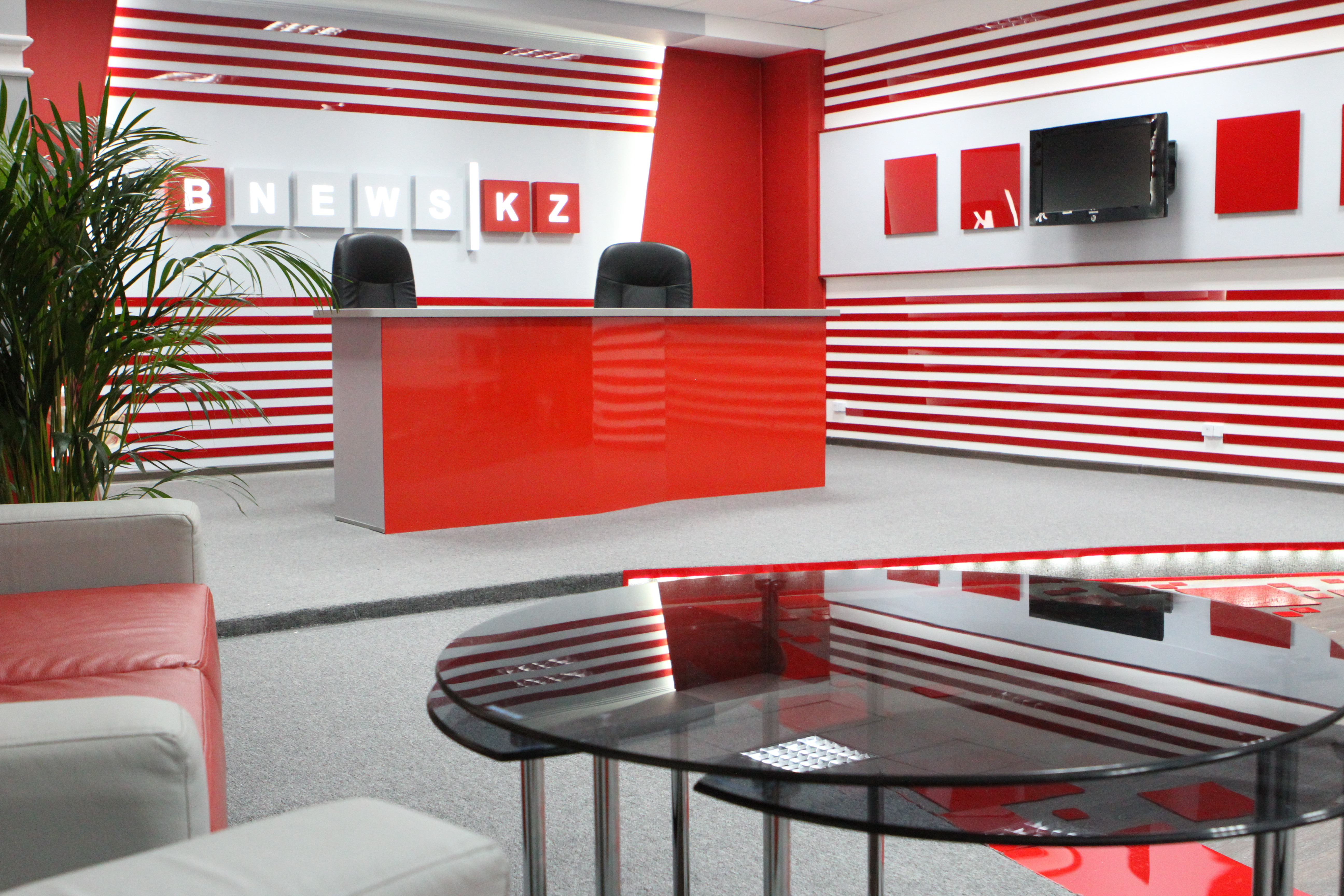 Қазақша (кирил): Bnews.kz студиясы